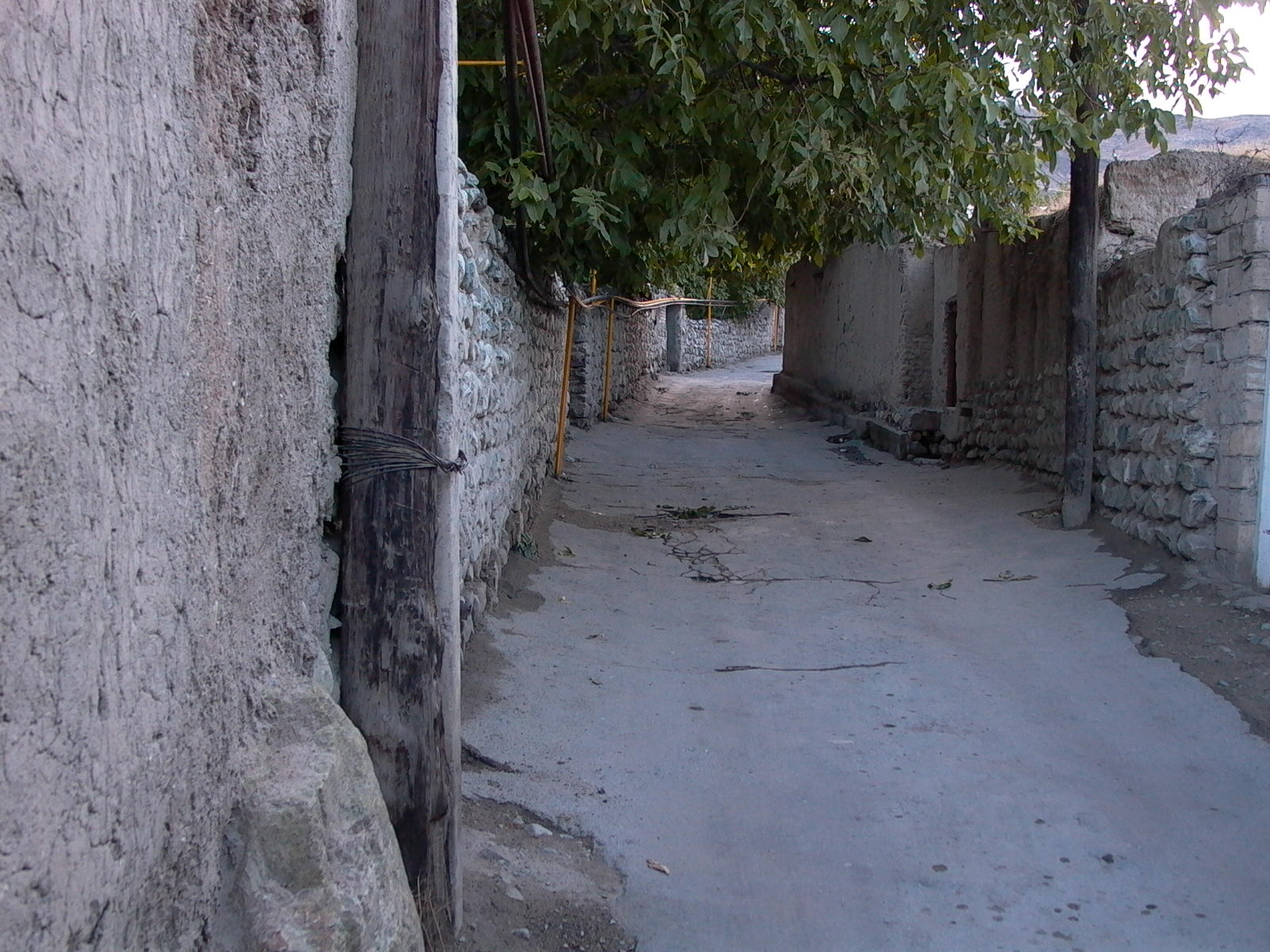 Nakhichevan Autonomous Republic, Azerbaijan